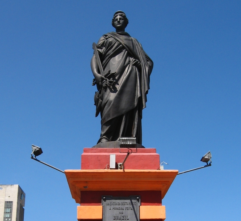 Estátua da Justiça, uma das quatro estátuas de bronze da Ponte Maurício de Nassau - Recife, Pernambuco, Brasil